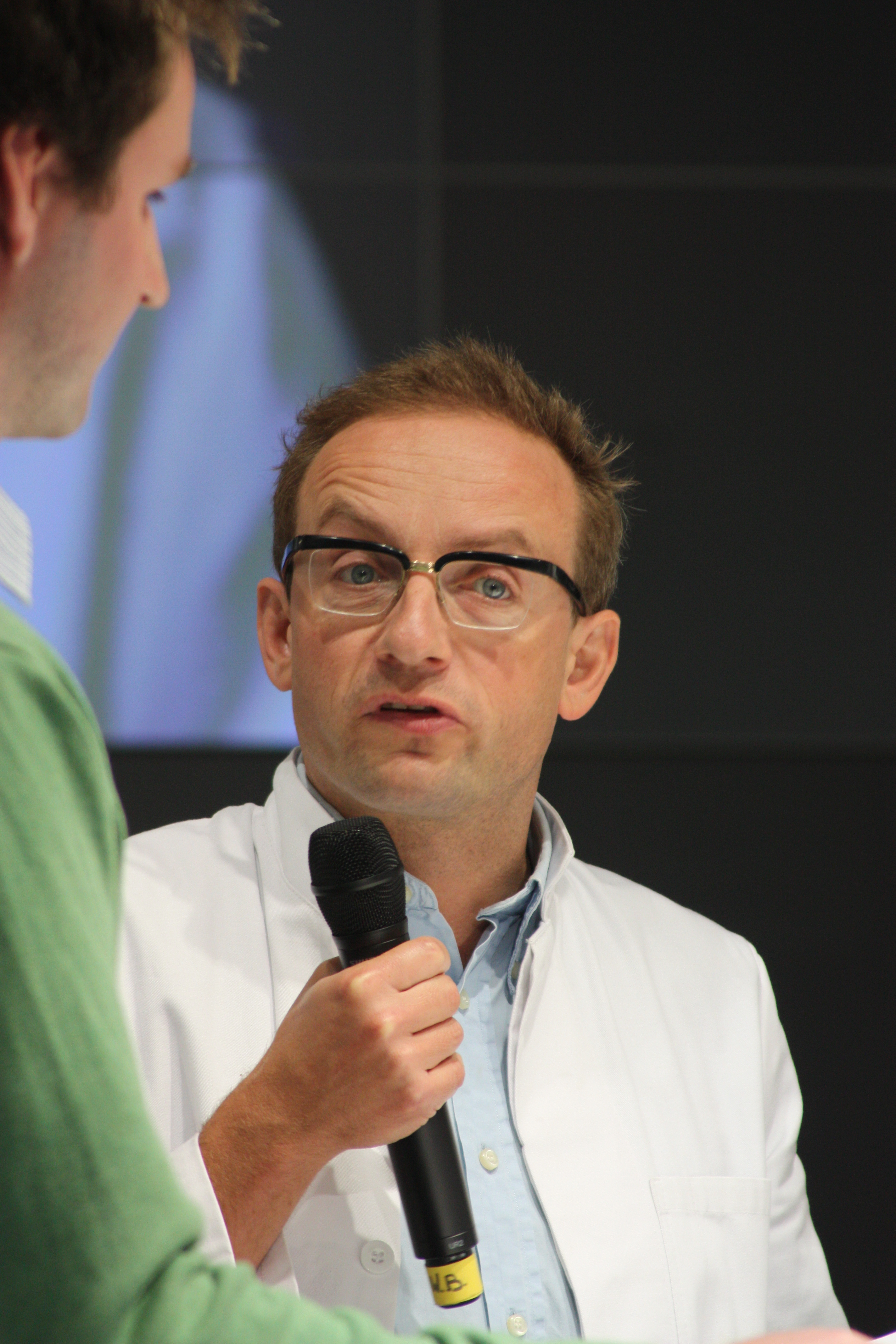 IFA 2010, Berlin